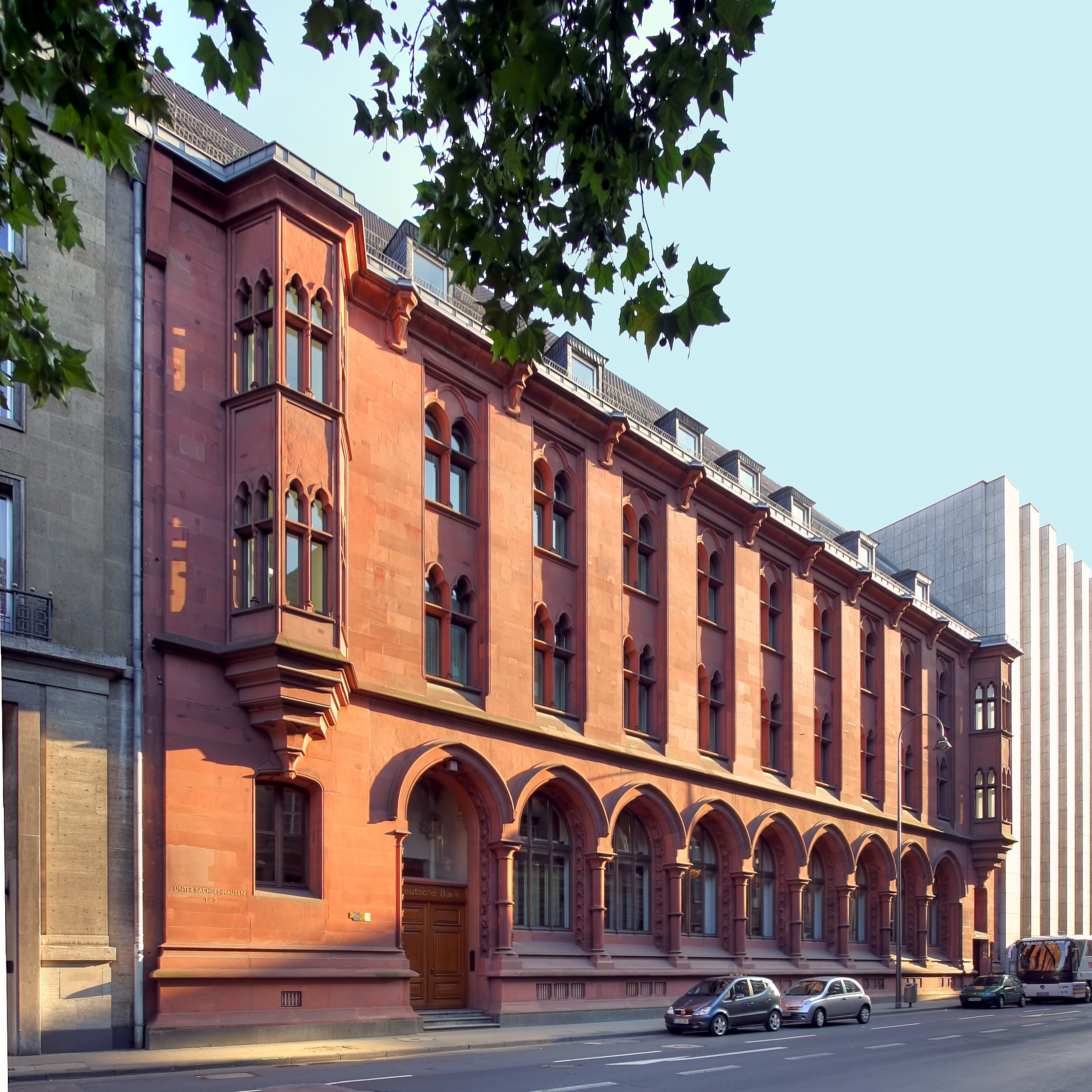 Deutsche Bank, Unter Sachsenhausen 1-3, Köln. Ehemals Landeszentralbank, davor Reichsbank. Architekt: Max Hasak, Baujahr: 1894-98. Die Deutsche Bank belegt mehrere Gebäude in einem Block: An den Dominikanern 11-27, Unter Sachsenhausen 1-3 und Komödienstraße/Andreaskloster